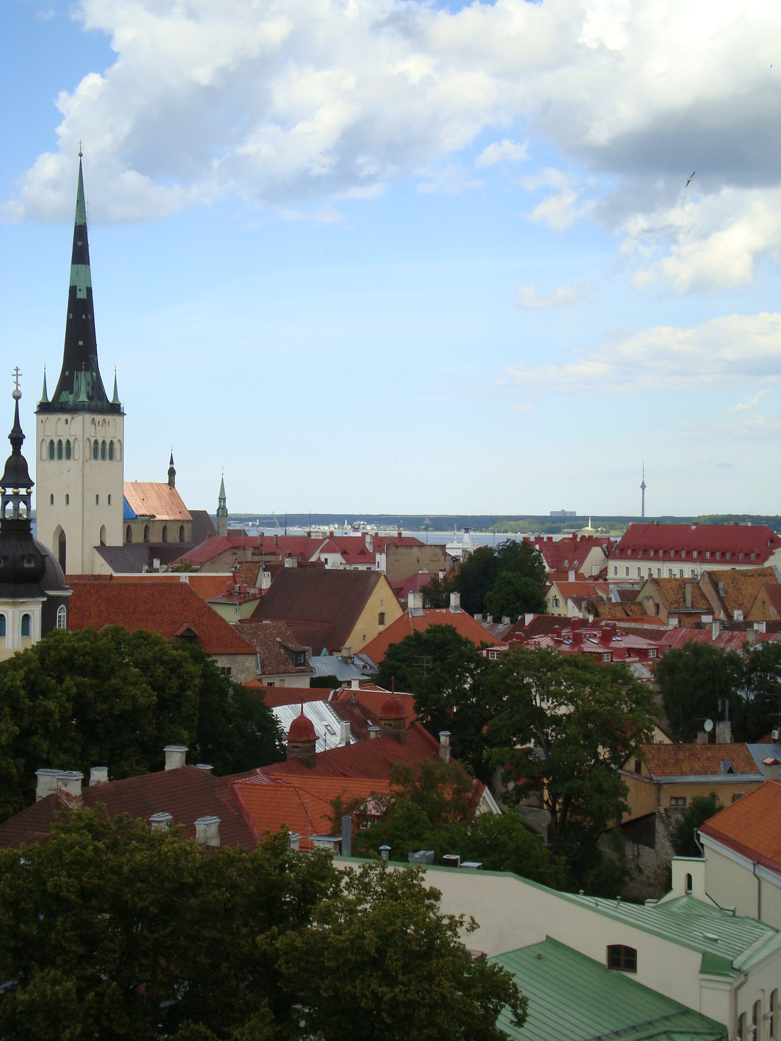 Mynd af gömlu borginni í Tallinn, höfuðborg Eistlands Нохчийн: Сурт къена г1ала Таллинахь, коьртан-г1ала Эстонхойн пачхьалкан